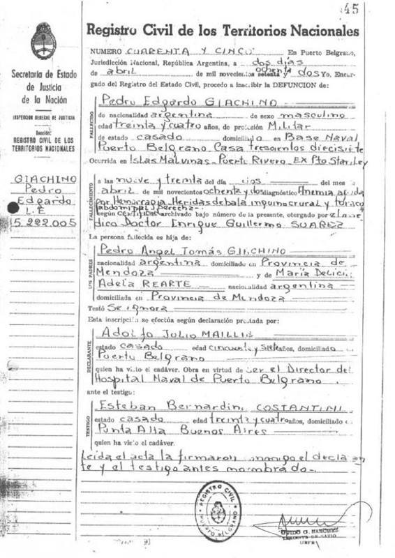 Acta de defunción de Pedro Edgardo Giachino, primer caído en combate de la Guerra de las Malvinas, fallecido en Puerto Rivero (Puerto Argentino / Port Stanley) el 2 de abril de 1982.